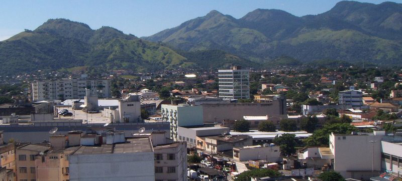 Campo Grande- Comércio